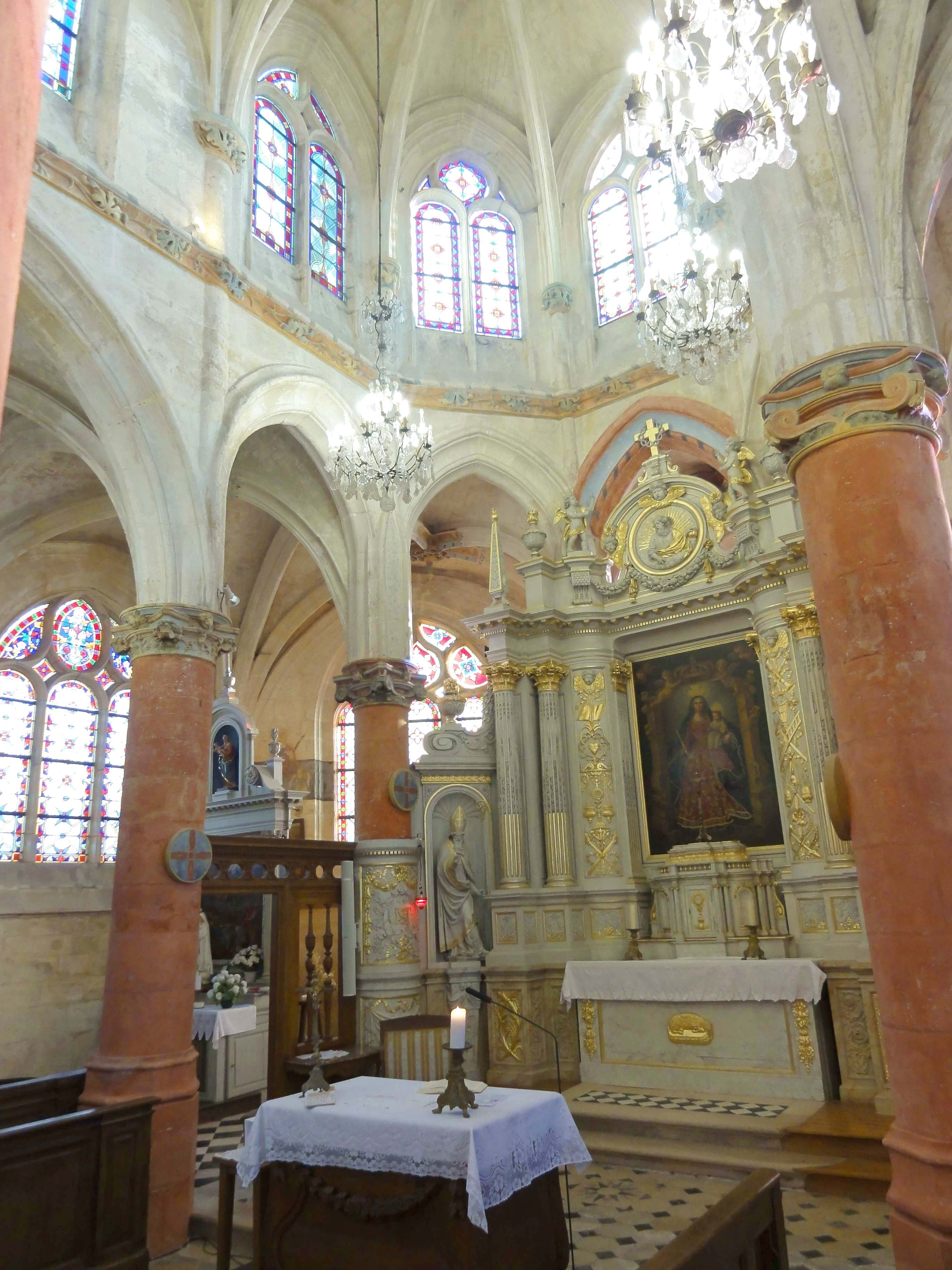 Intérieur de l'église - voir titre.